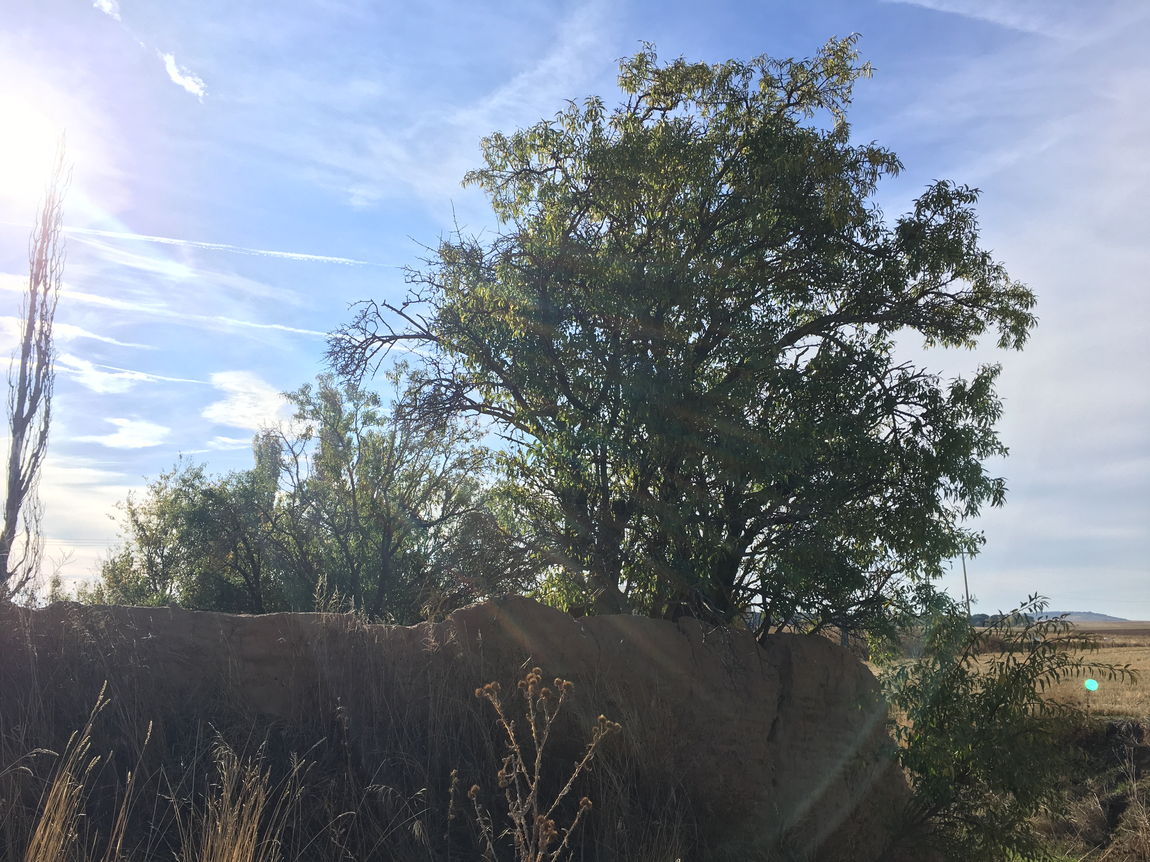 Villaesper Milenario